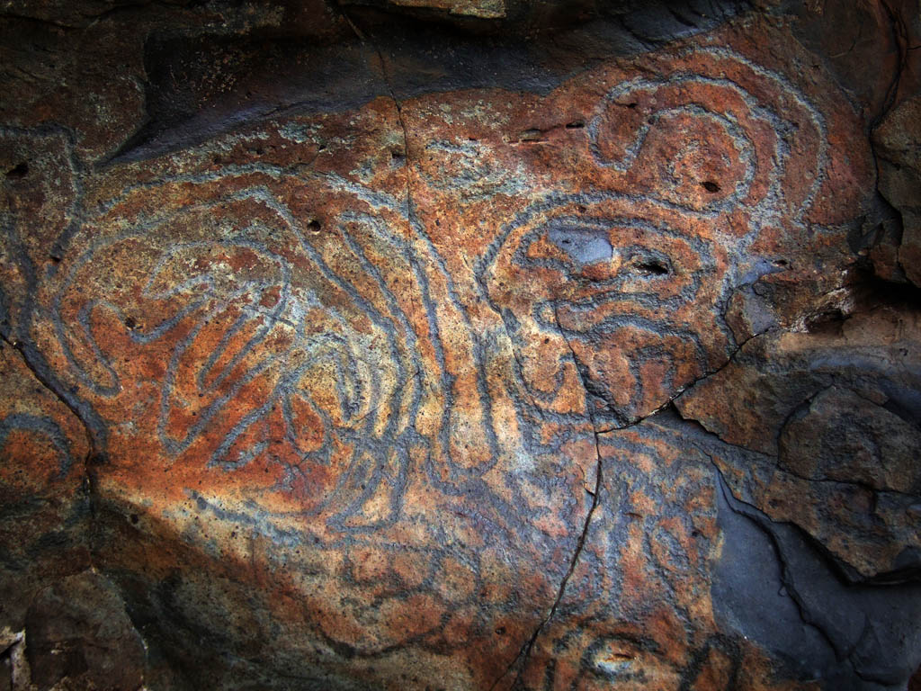 Cueva de Belmaco, Petroglyphen